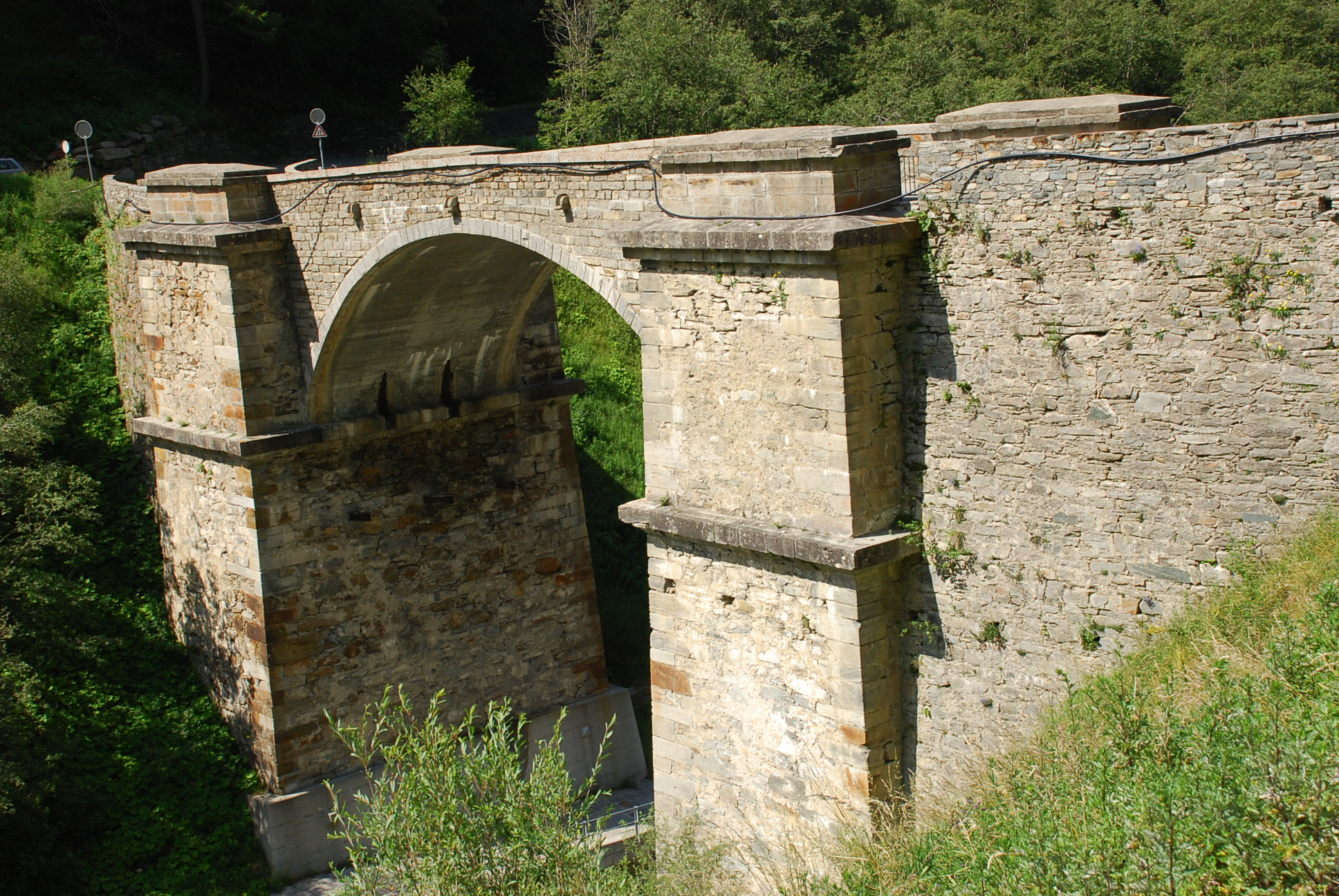 Pont du Kanter Ancien CH-3907 Simplon